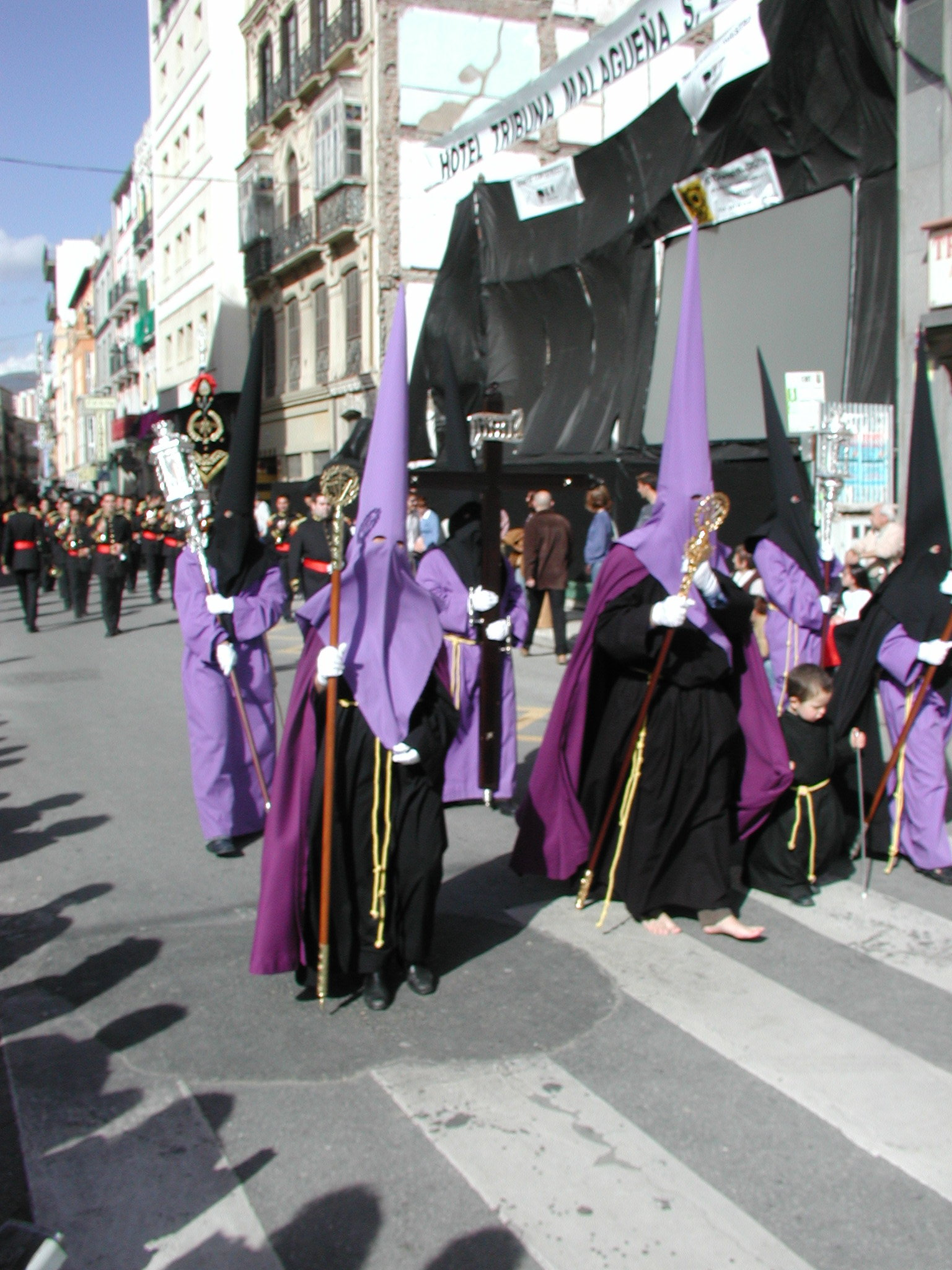 Osterprozession in Malaga